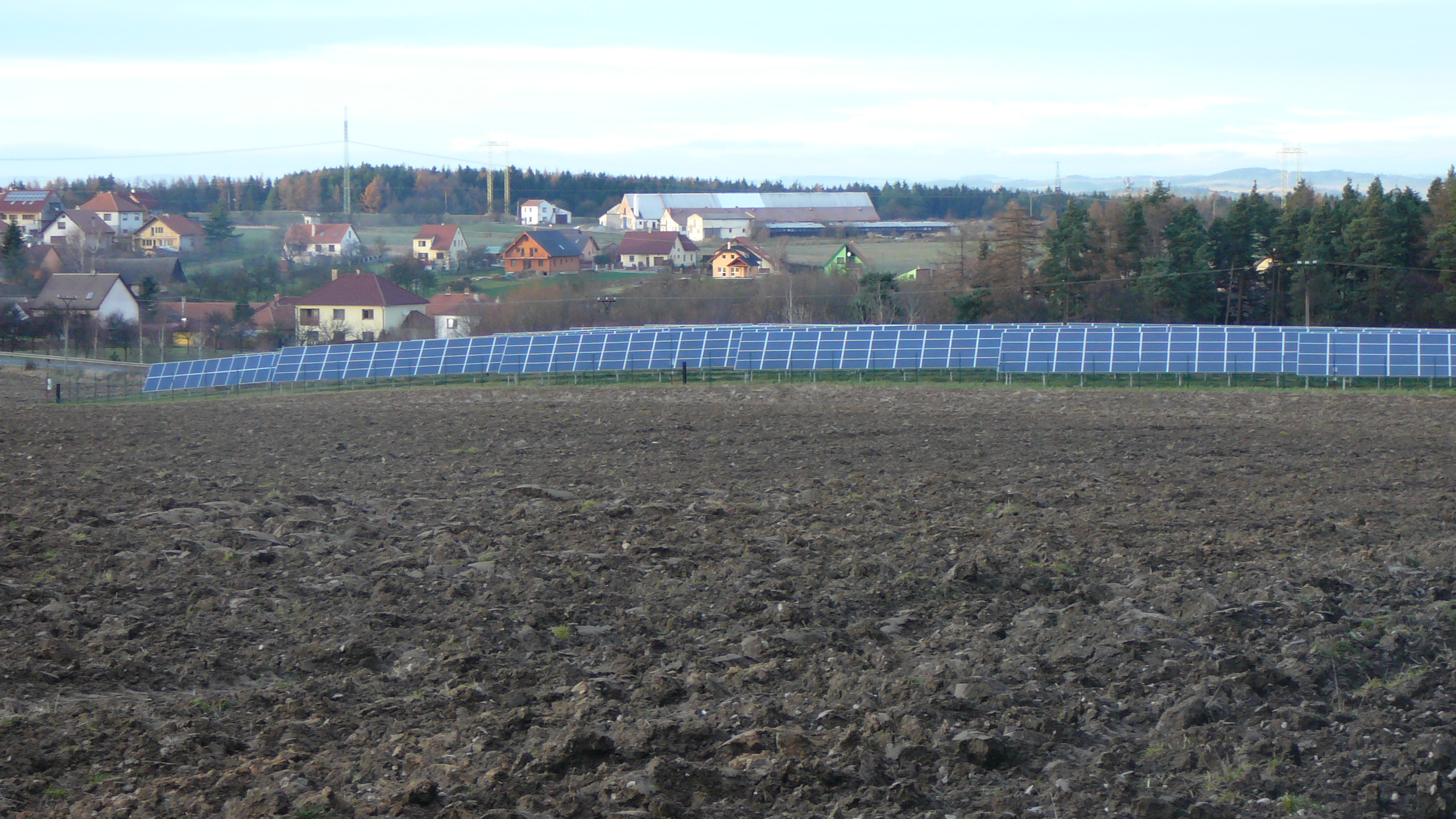 Pohled na FVE Přibyslavice (okr. Brno-venkov)